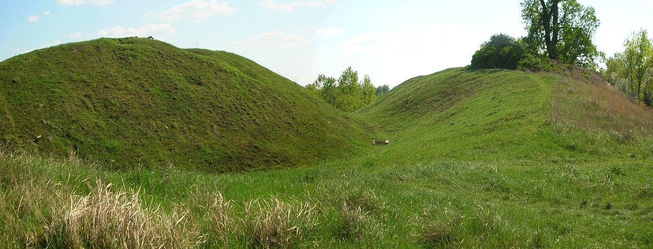 Grodzisko Wyszogród w Bydgoszczy - wały i fosa